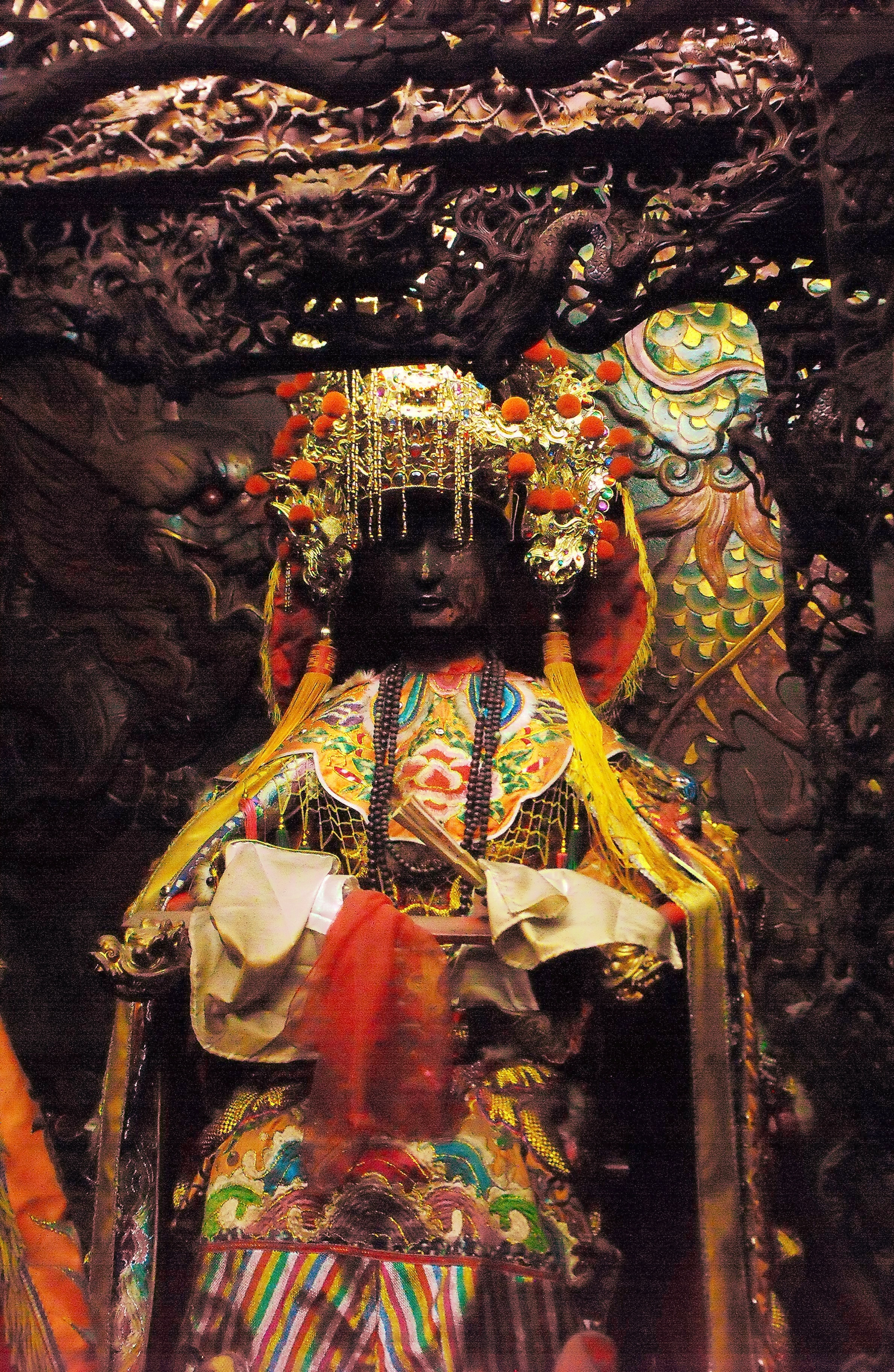 嘉邑城隍廟媽祖神像